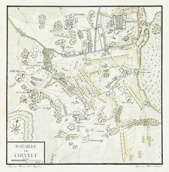 Битва при Крефельде